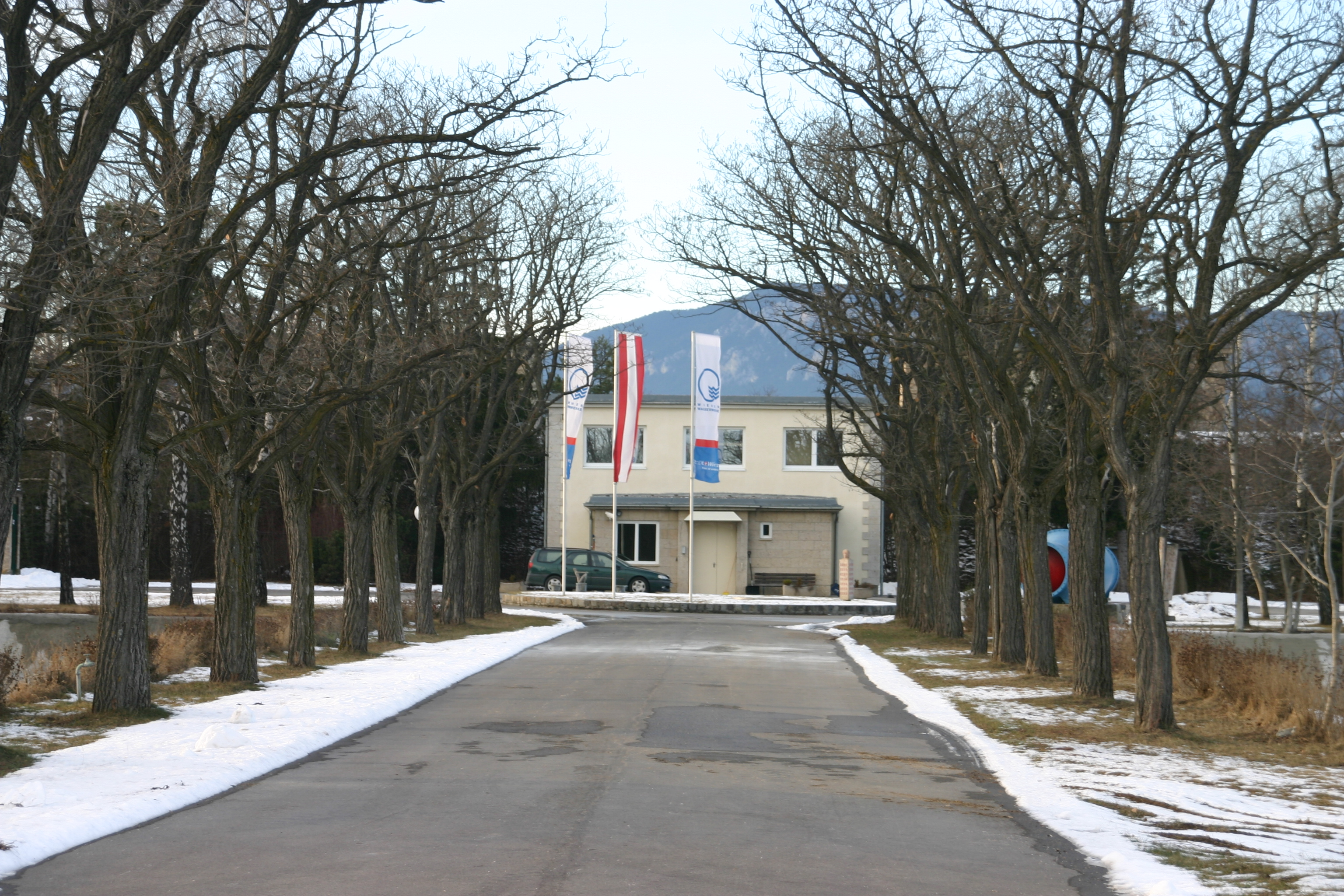 Wasserbehälter Neusiedl am Steinfeld Eingangsbereich